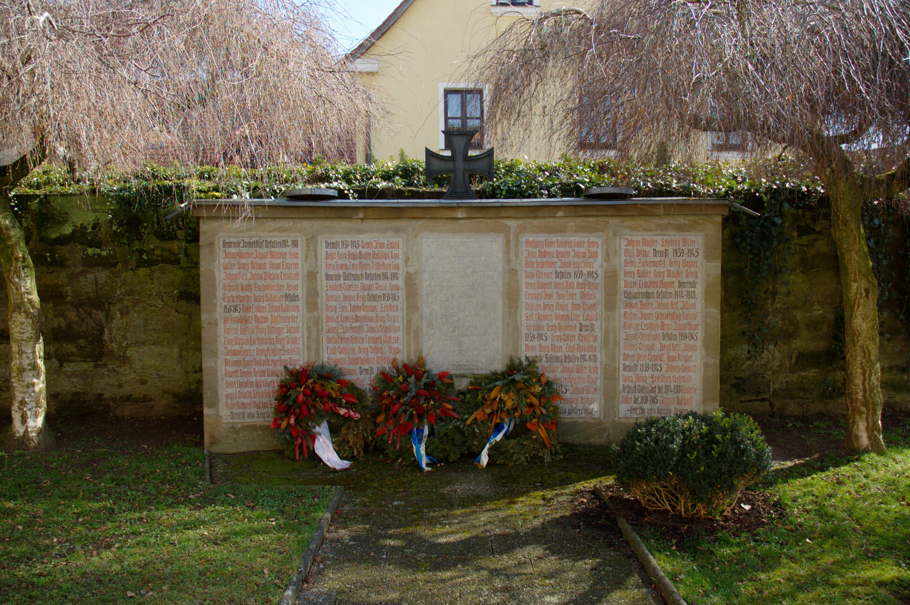 Kriegerdenkmal Immeldorf bei der St. Georgskirche